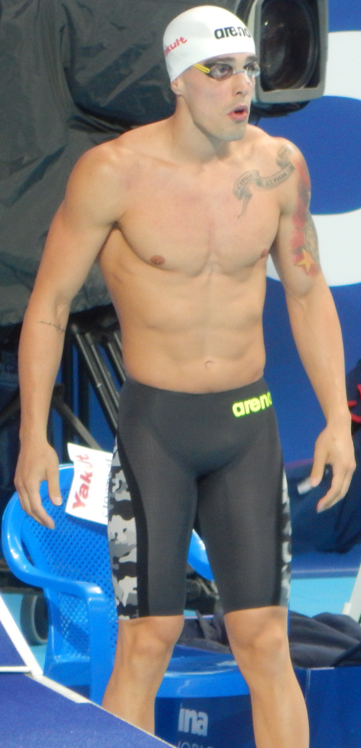 Бруно Фратус на чемпионате мира в Казани